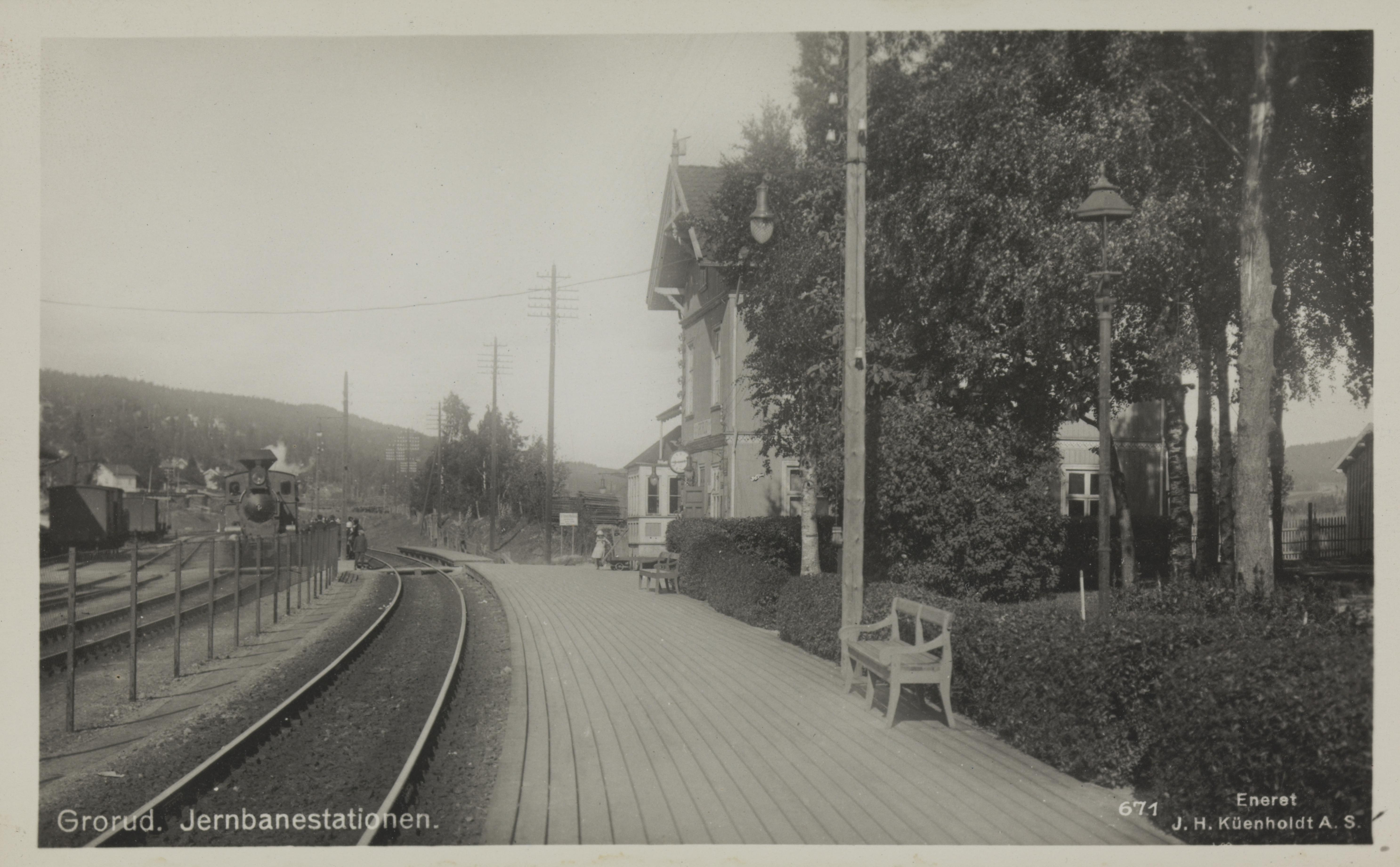 Bildet er hentet fra Nasjonalbibliotekets bildesamling Grorud,Grorud stasjon, Oslo, Oslo